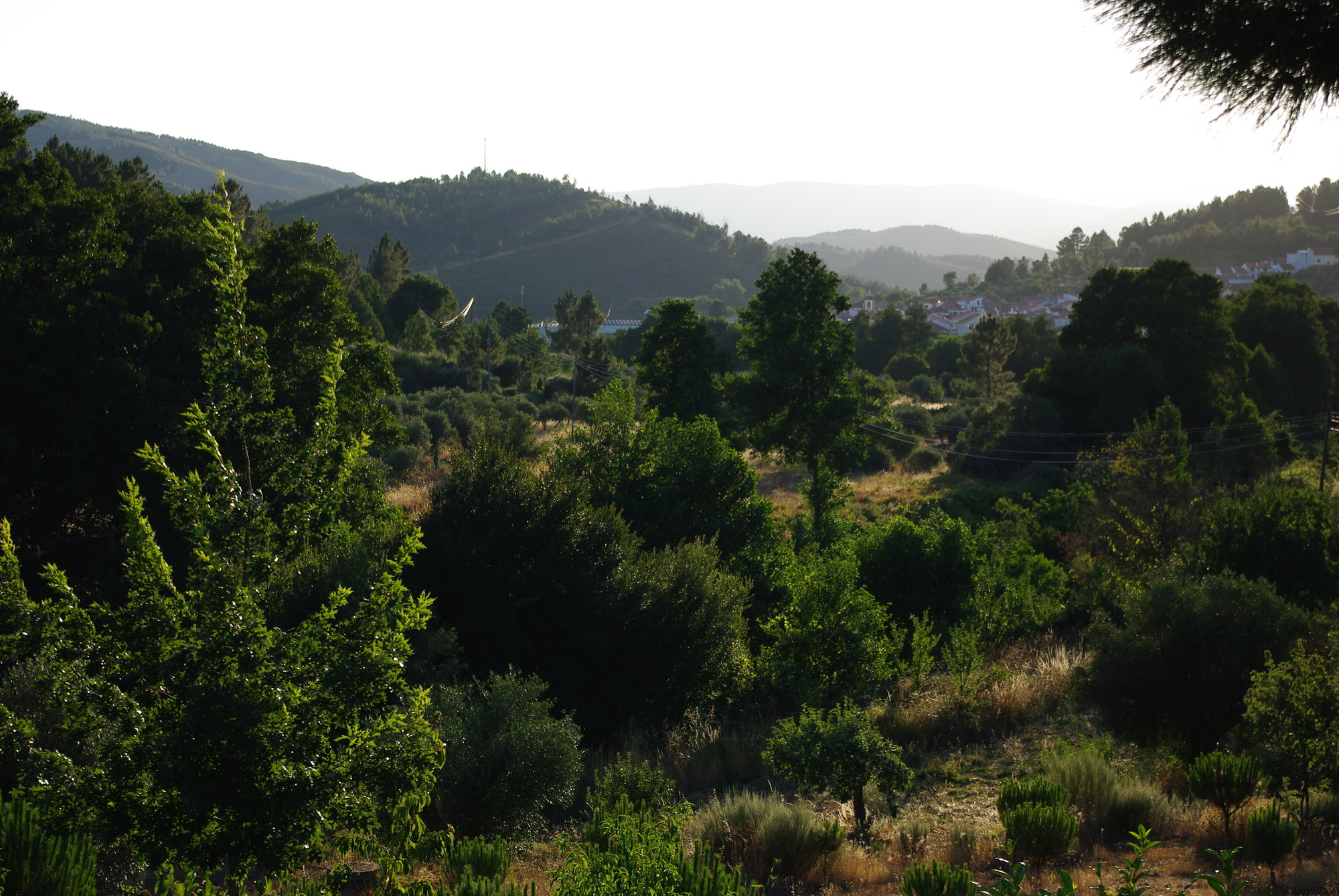 Vista desde o Vale Palaio